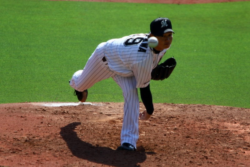 日本プロ野球 千葉ロッテマリーンズ 唐川侑己 投手 ピッチング